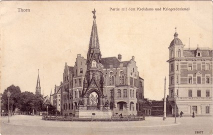 Pruski Pomnik Poległych w Toruniu.